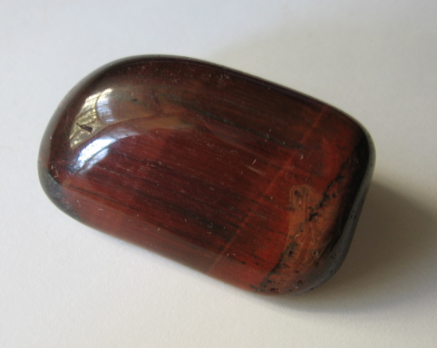 Бычий глаз. Галтовка.